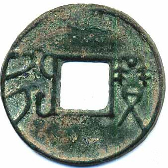 賹六化圜钱